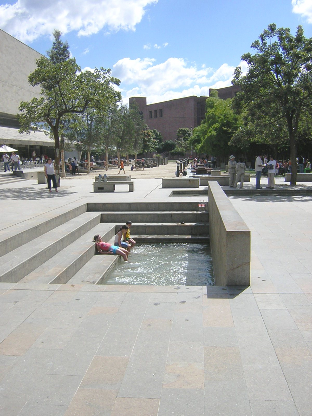 Parque de los Pies Descalzos, Medellín, Colombia